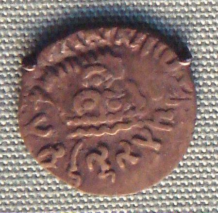 Gautamiputra Restruck On A Nahapana Coin